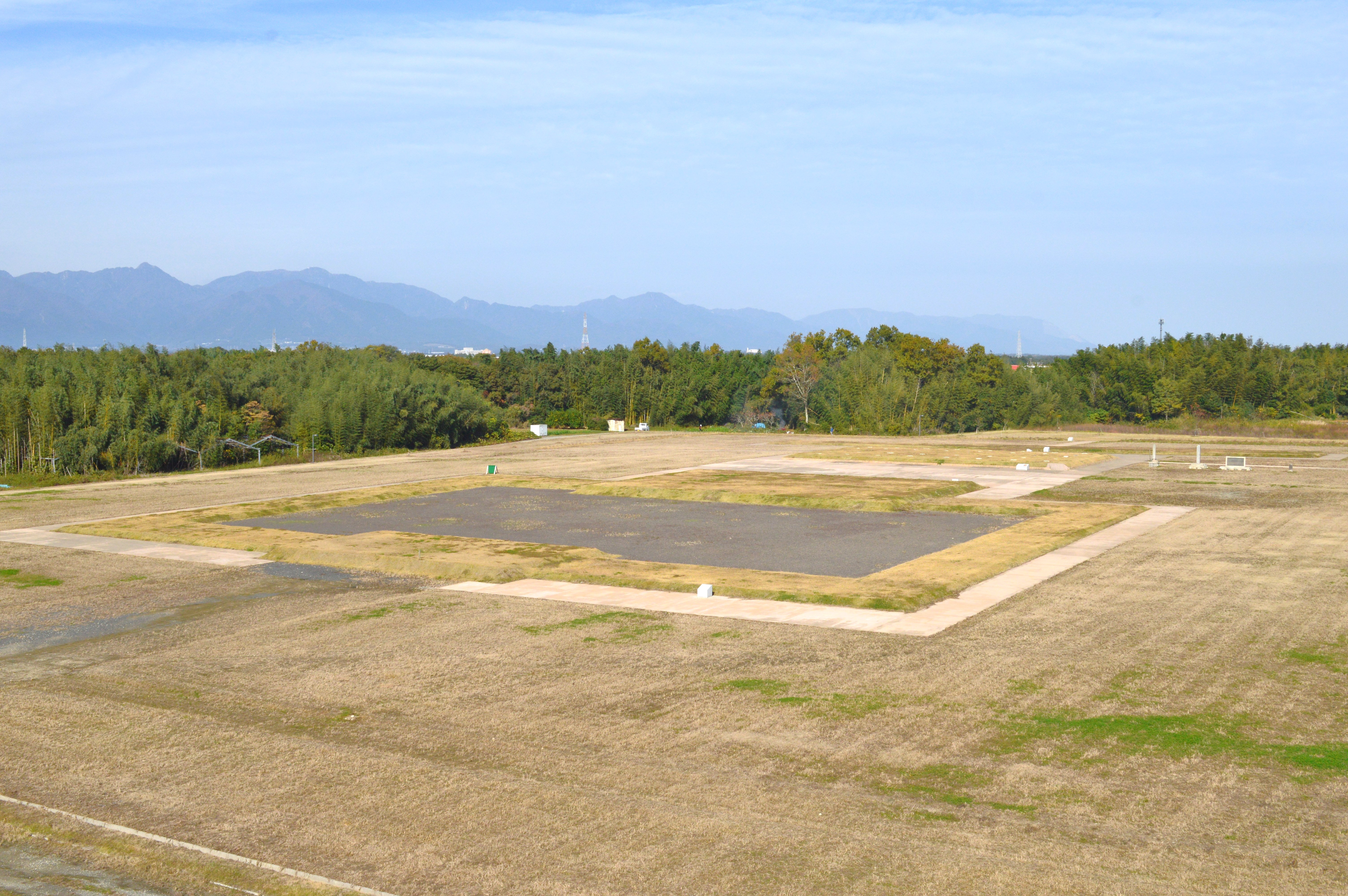 伊勢国分寺跡 概観